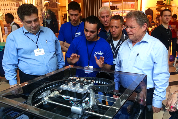 מימין- מנכ"ל רשת אורט, צבי פלג, ותלמידים, מציגים פיתוחים טכנולוגים במסגרת שבוע המדע